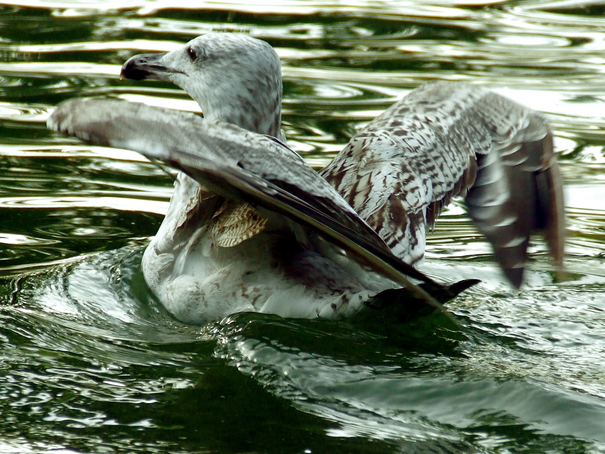 Gabbiano dal becco scuro in ammaraggio a Roma, Giardin del Lago di Villa Borghese